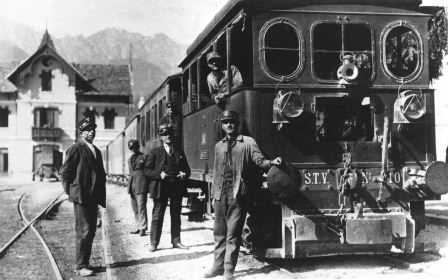 Stazione tranviaria di Recoaro nel 1910